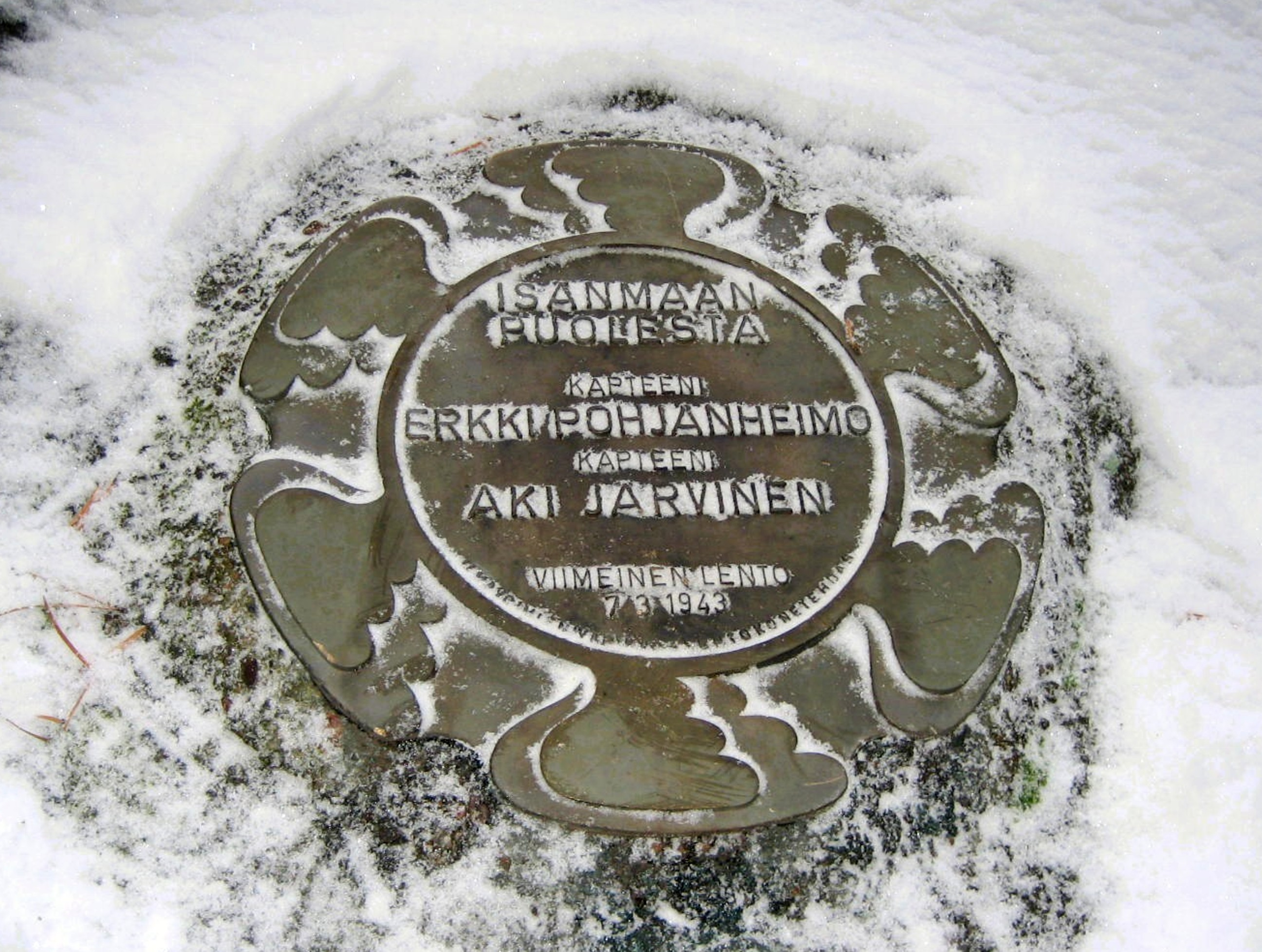 Kapteeni Erkki Pohjanheimon ja kapteeni Akilles Järvinen muistolaatta Tampereen Koivistonkylässä. Sodanaikainen lento-onnettomuus Pyry-hävittäjän koelennolla 7. maaliskuuta 1943.